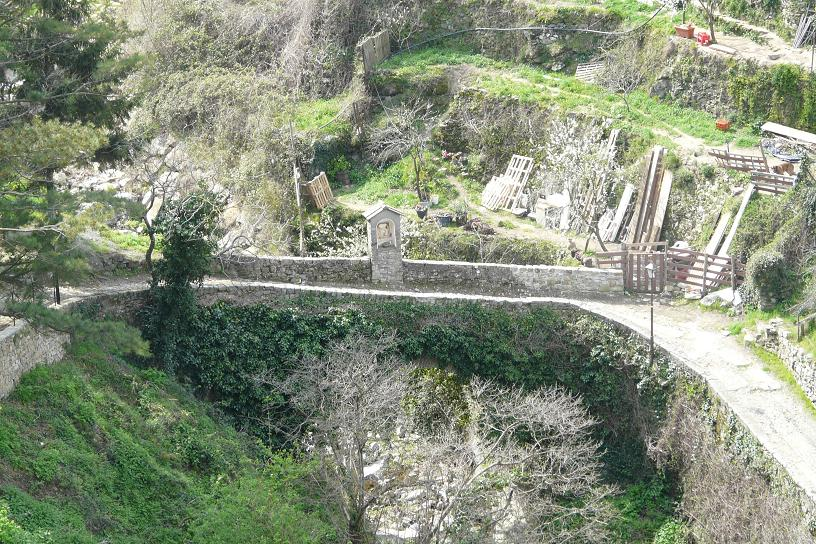 Ceriana, Liguria, Italia